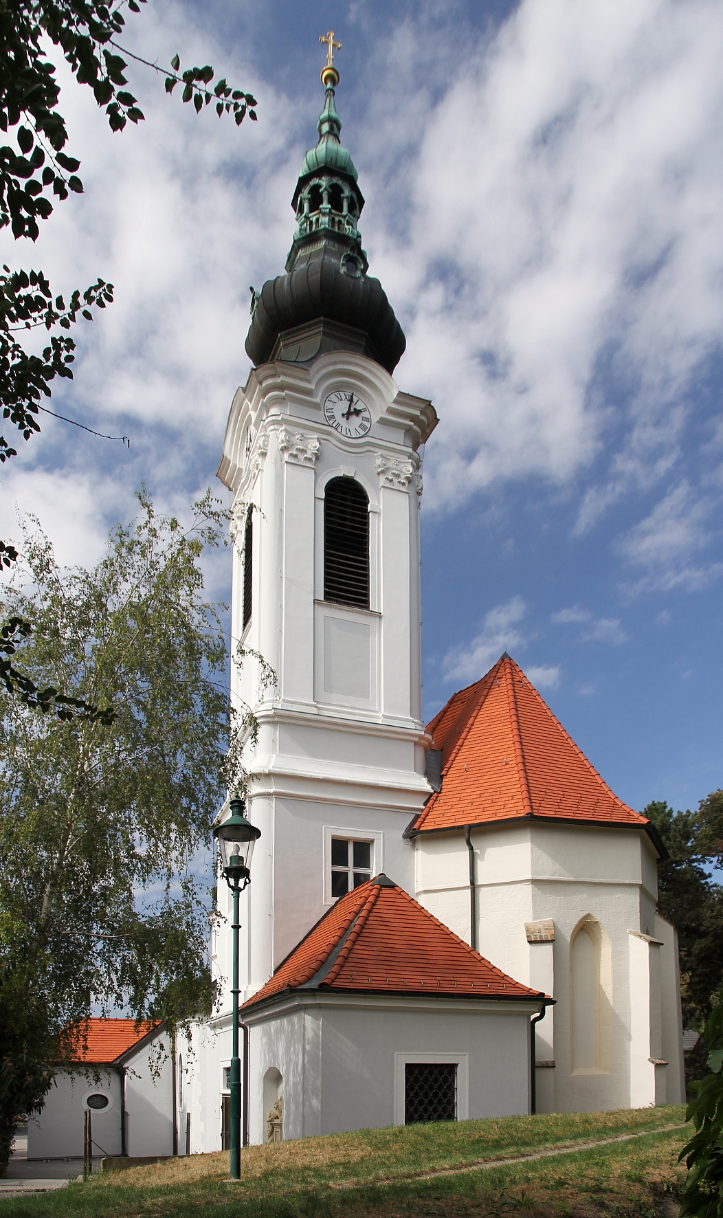 Die Südostansicht der kath. Pfarrkirche hl. Katharina in der niederösterreichischen Marktgemeinde Langenzersdorf.